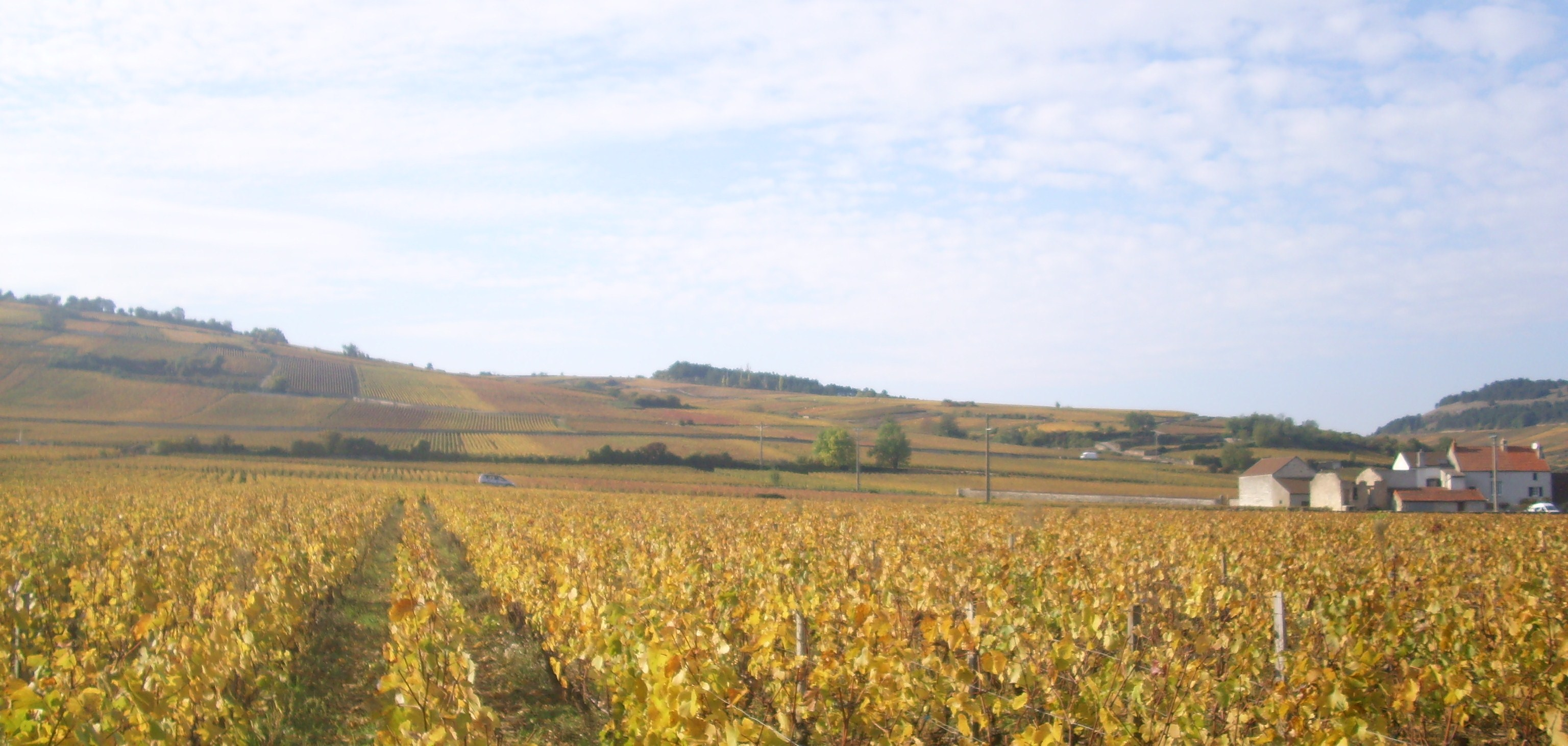 Vue d'une partie du vignoble de Pommard (AOC)